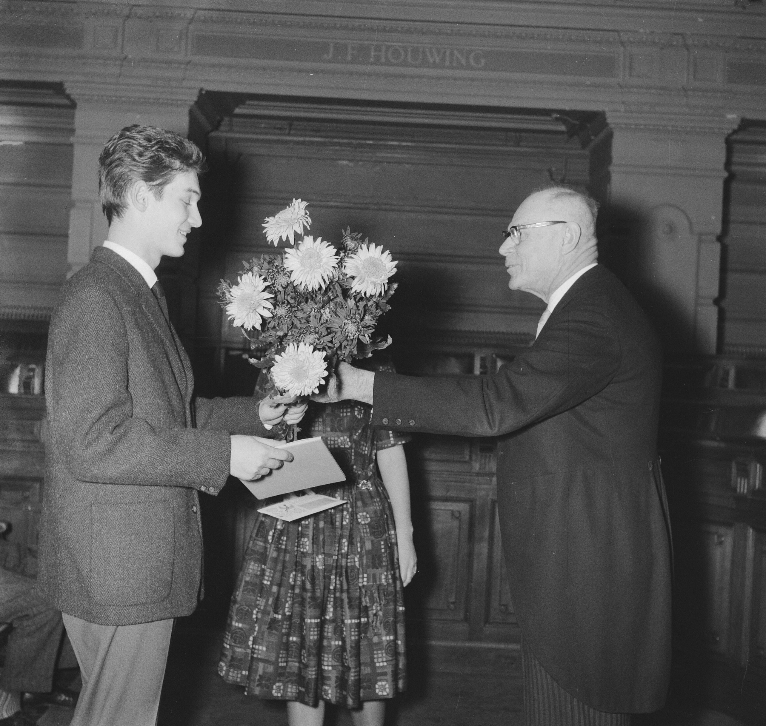 Collectie / Archief : Fotocollectie Anefo Reportage / Serie : Reina Prinsen Geerligsprijs 1961 Beschrijving : Uitreiking Reina Prinsen Geerligsprijs aan schrijver Peter van Gestel (links) door P.J. Prinsen Geerligs Datum : 24 november 1961 Locatie : Amsterdam, Noord-Holland Trefwoorden : auteurs, literatuur, prijsitreikingen, schrijvers Persoonsnaam : Gestel, Peter van, Prinsen Geerligs, P.J. Fotograaf : Nijs, Jac. de / Anefo Auteursrechthebbende : Nationaal Archief Materiaalsoort : Negatief (zwart/wit) Nummer archiefinventaris : bekijk toegang 2.24.01.03 Bestanddeelnummer : 913-2225